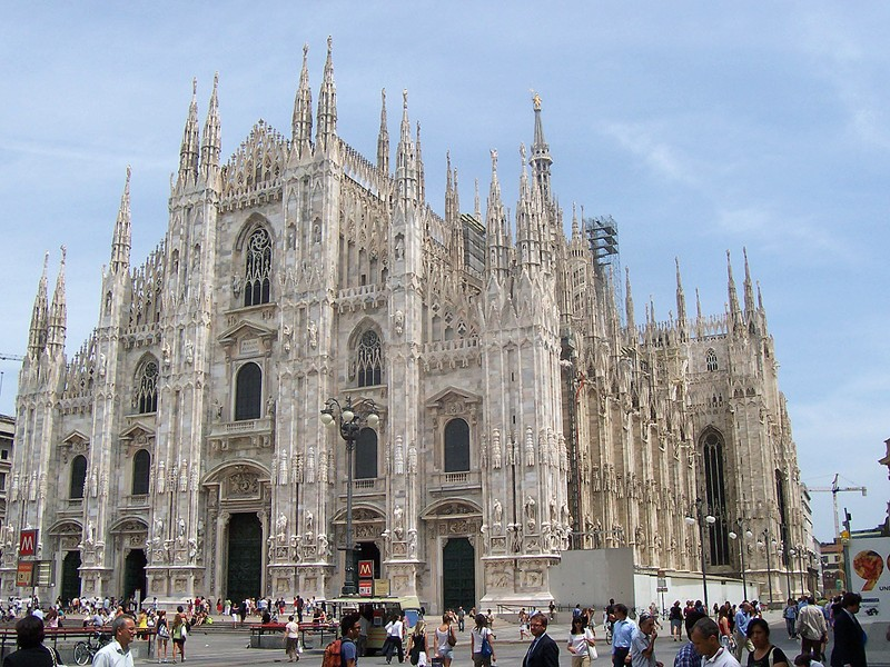 Milano - Duomo